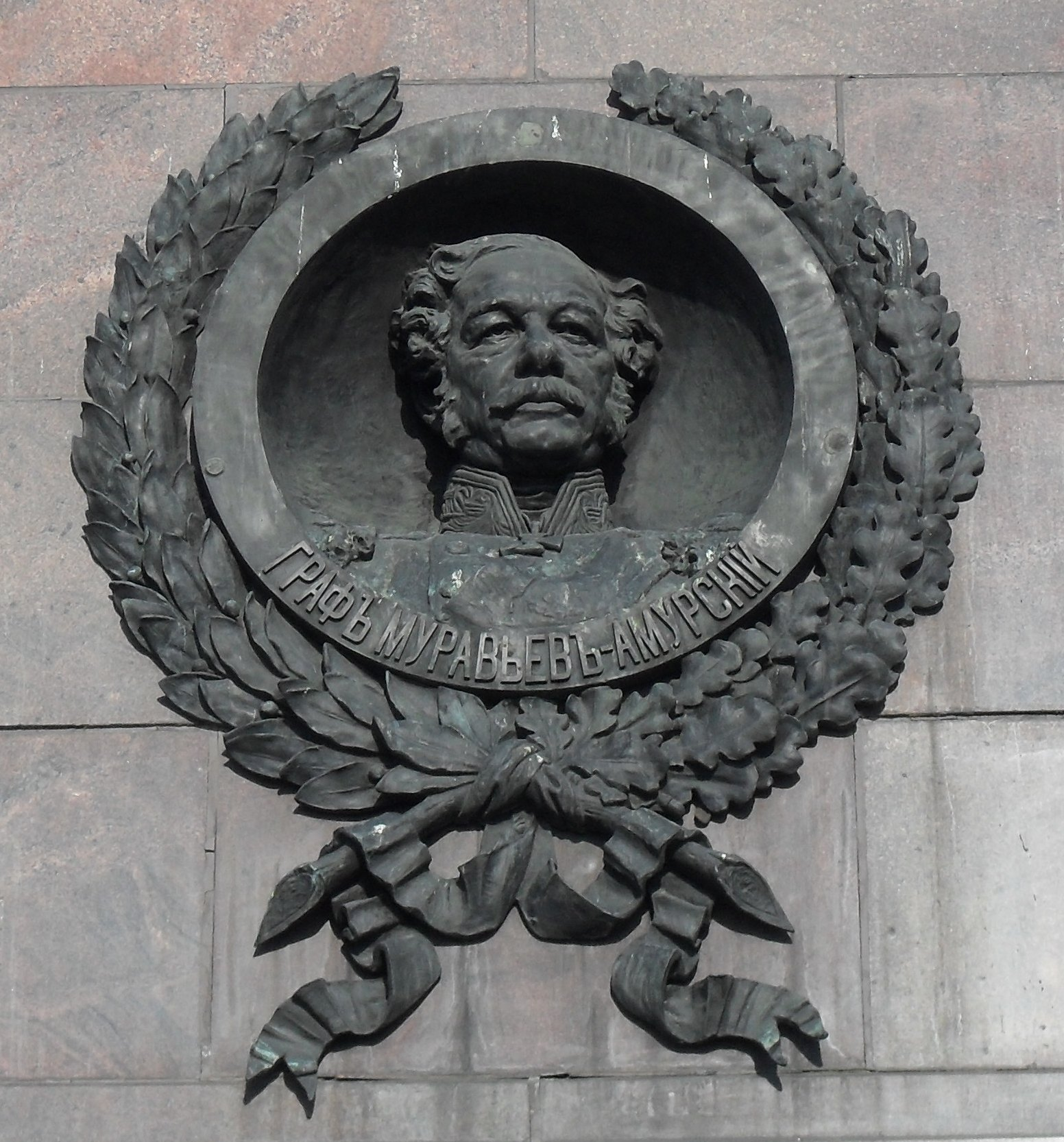 Иркутск. Памятник Александру III. Портрет Н. И. Муравьева-Амурского на постаменте.